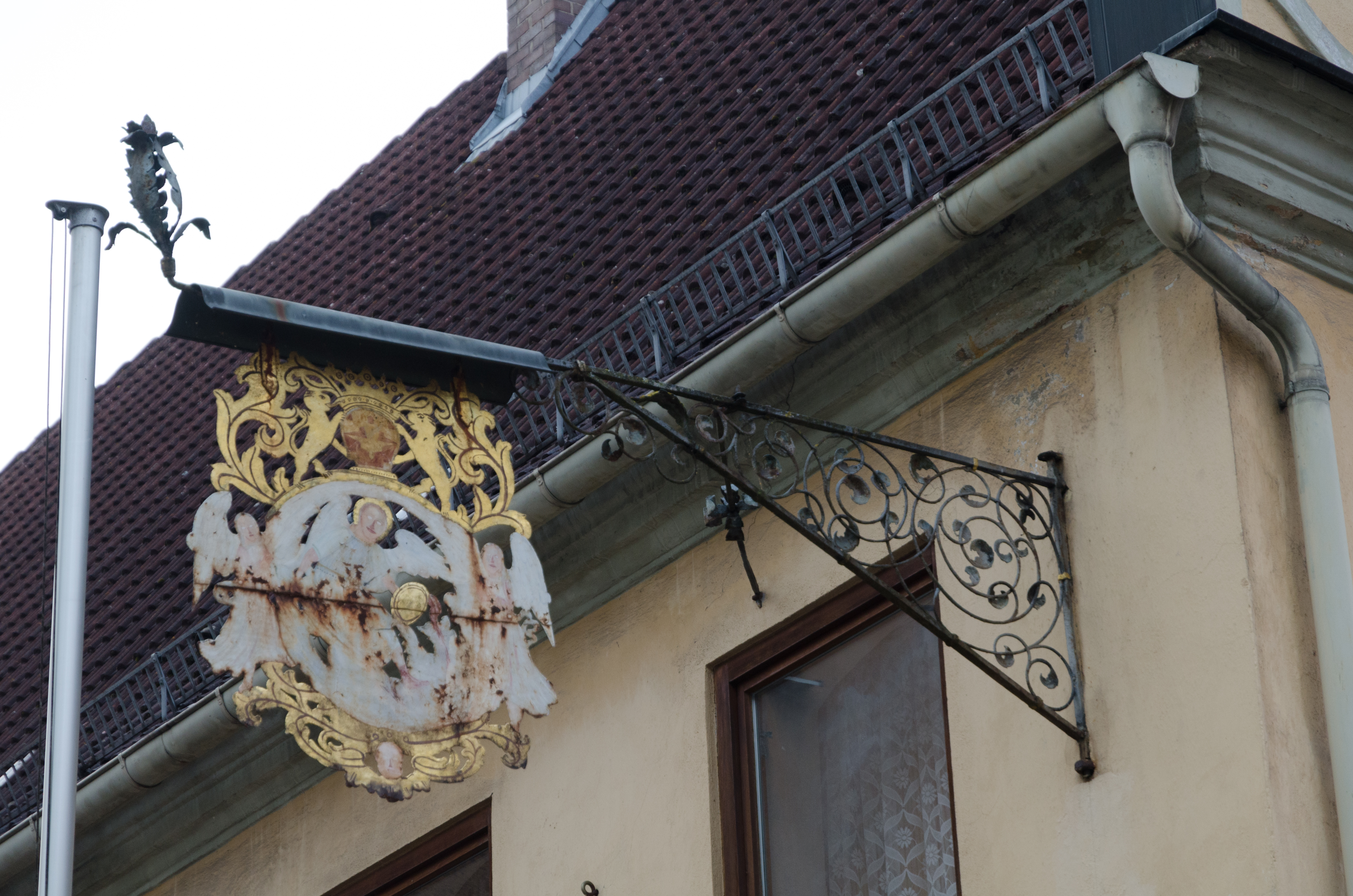 Oettingen in Bayern, Hofgasse 15